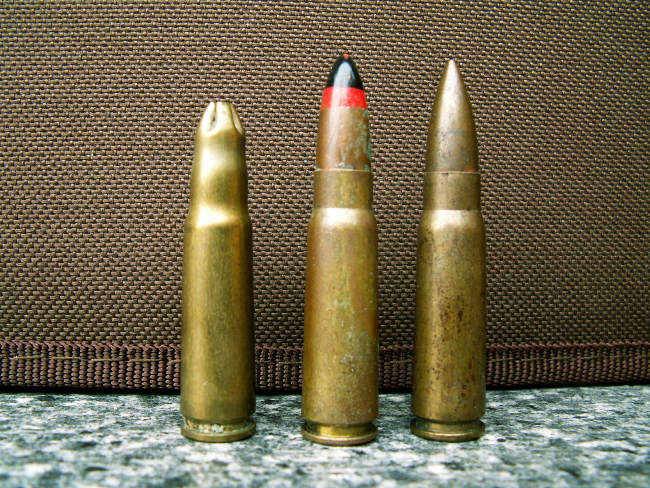 Manevrski, prebojno-zažigalni in navaden vojaški naboj M67 7,62x39. To je jugoslovanska izvedenka naboja M43.